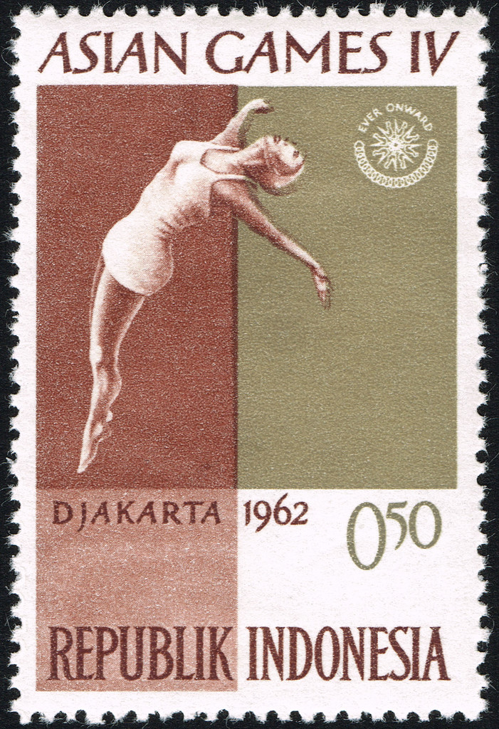 Asian Games IV